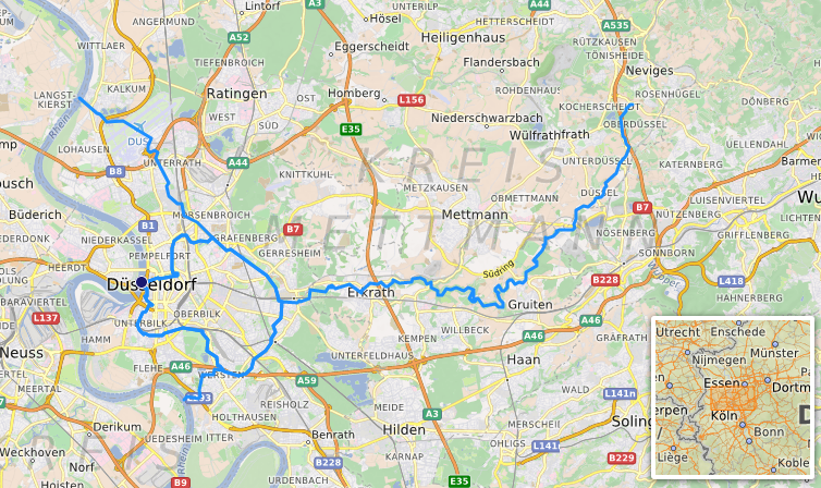 carte réalisée sur umap, [1] This map may be incomplete, and may contain errors. Don't rely solely on it for navigation.